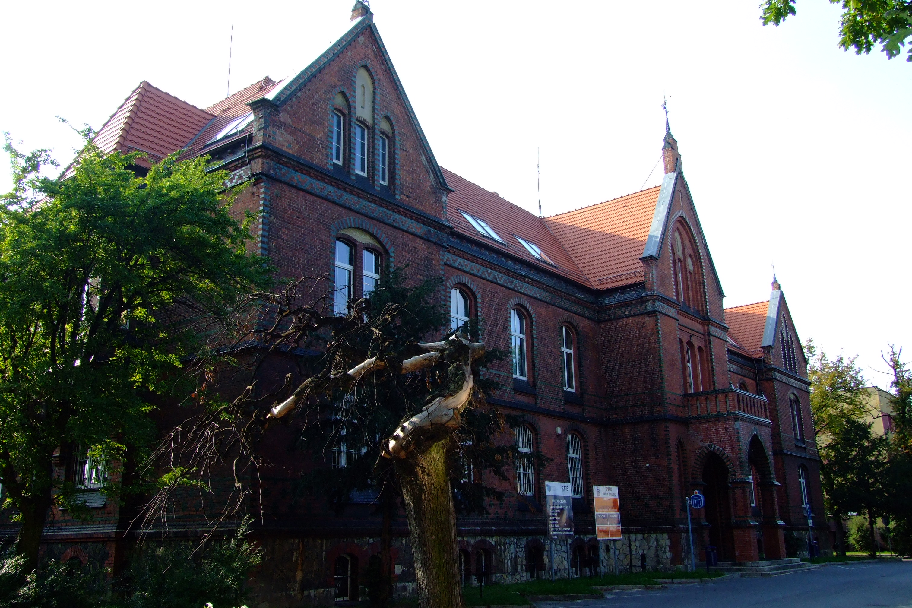 Budynek starostwa powiatowego w Lublińcu